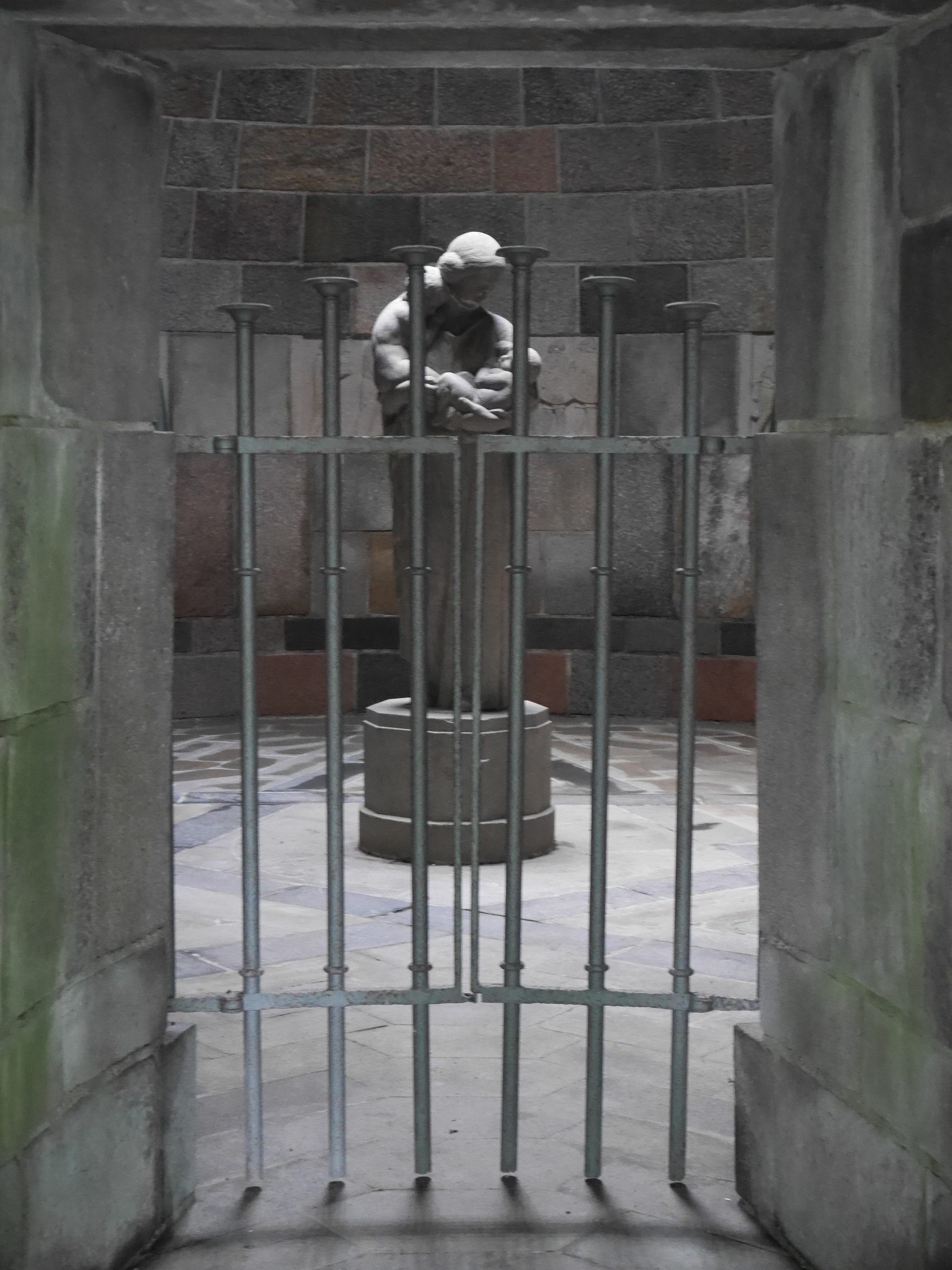 I hulen i Mindehøjen i Søndermarken, Frederiksberg